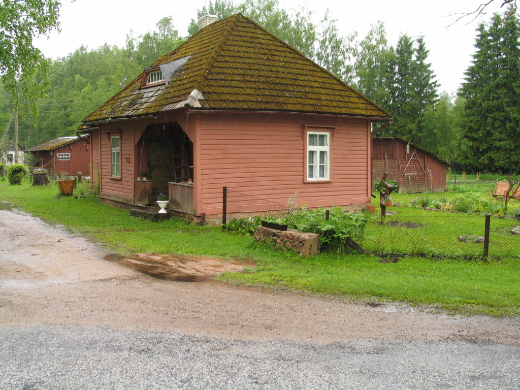 Laatre jaamahoone, Veelikse küla